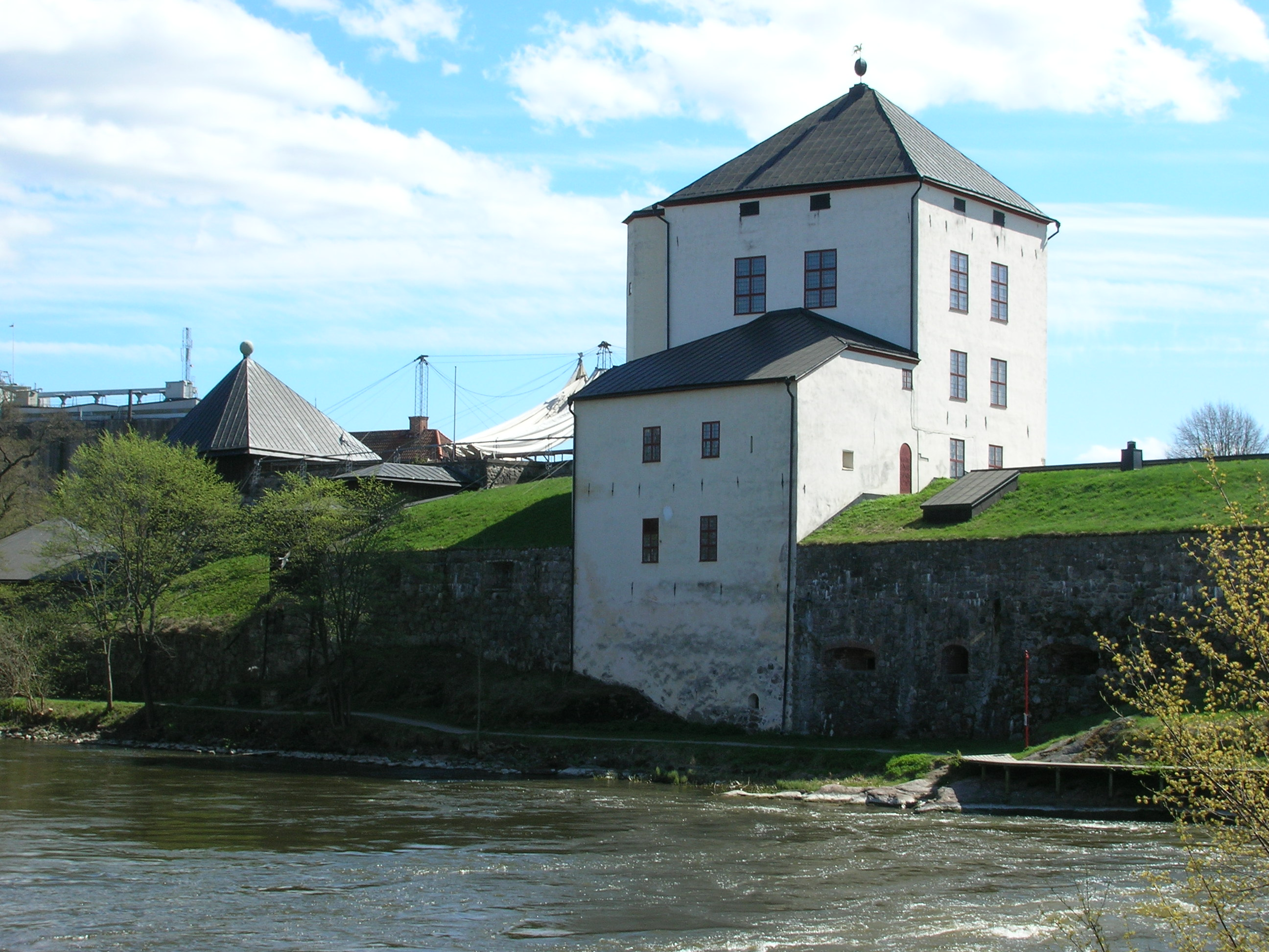 Nyköpingshus 13 maj 2006. Fotograf: Niklas Nordblad